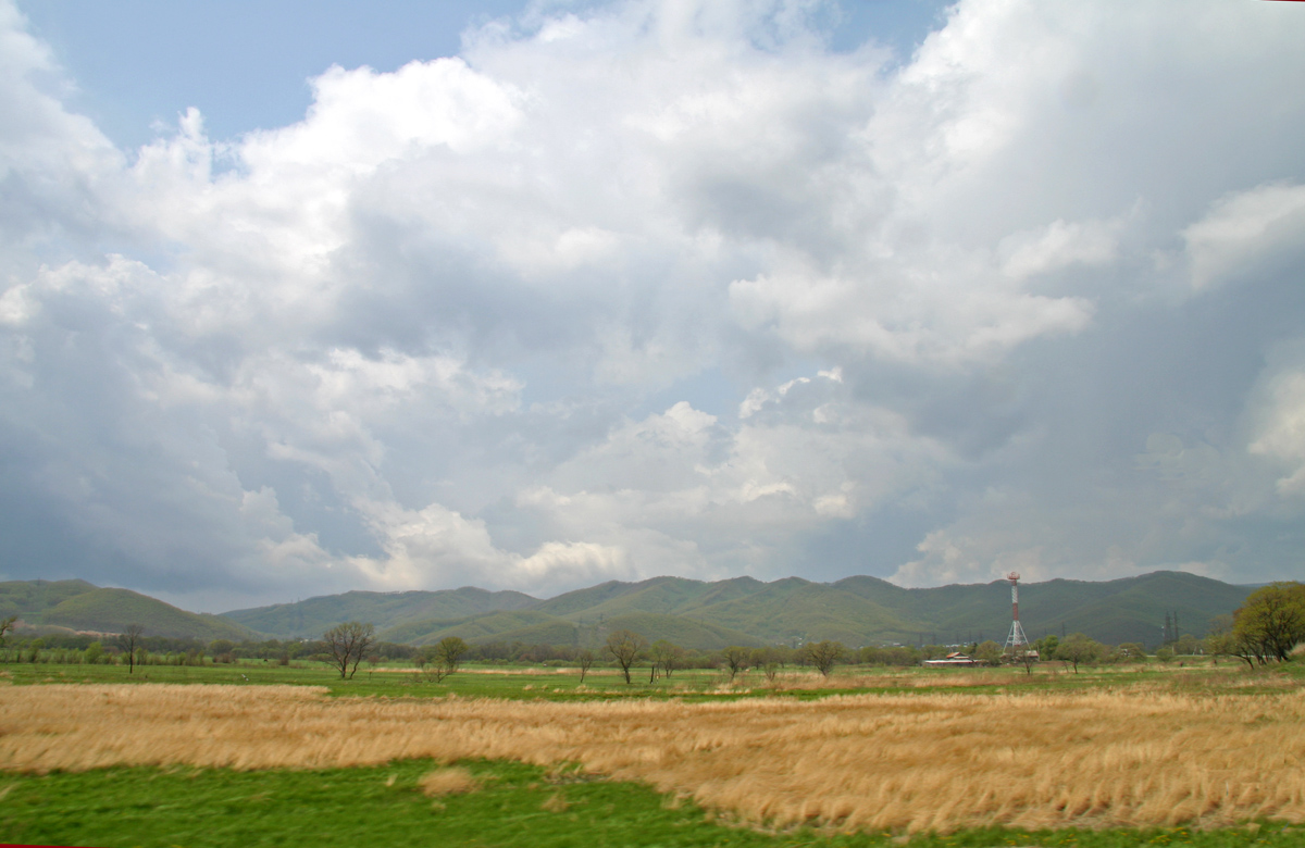 На подъезде к Штыково.